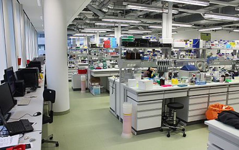 Wielopoziomowa architektura nowego budynku IMP, łącząca różne poziomy i funkcje.